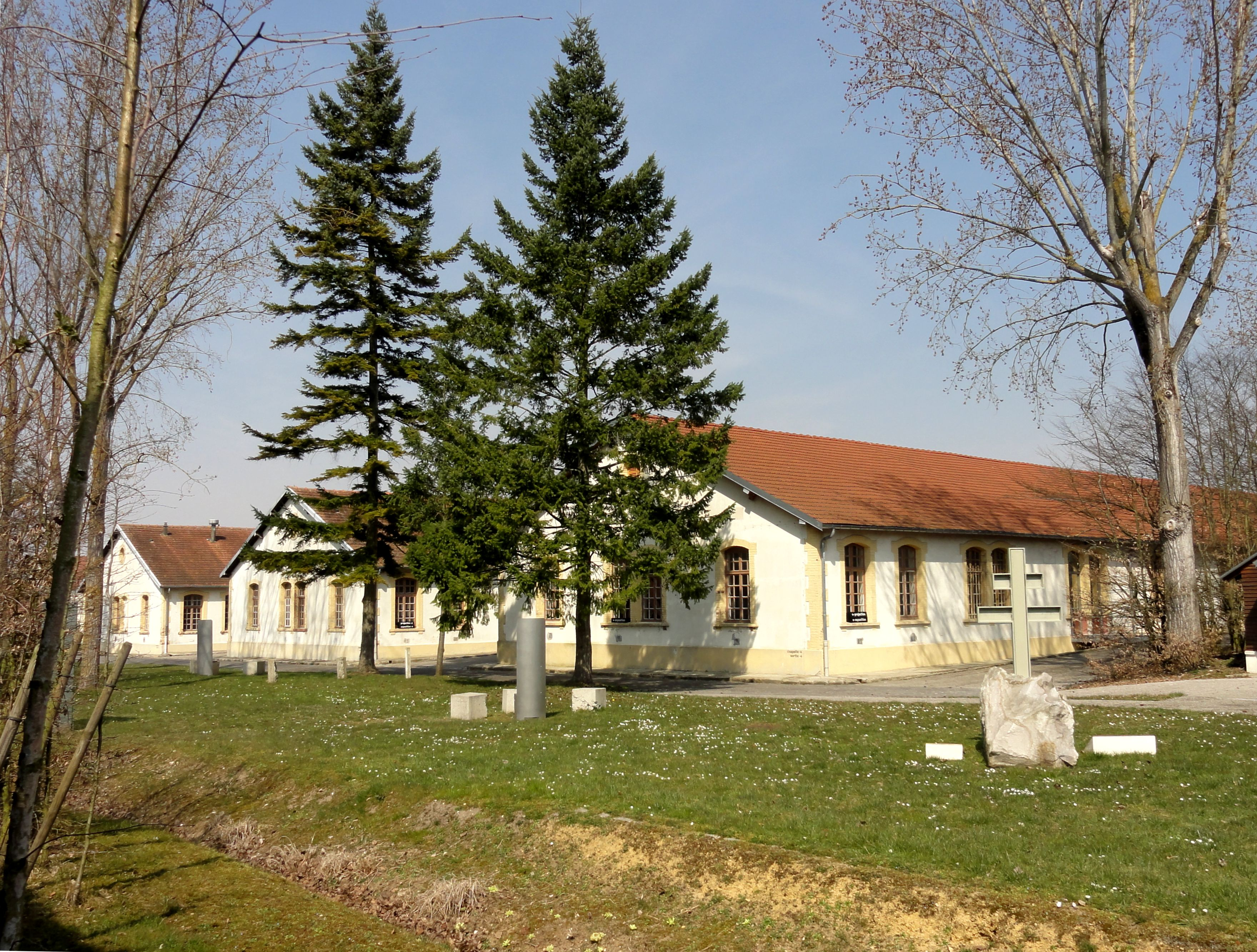 Ancien camp d'internement et de déportation de Royallieu, à Compiègne (Oise).